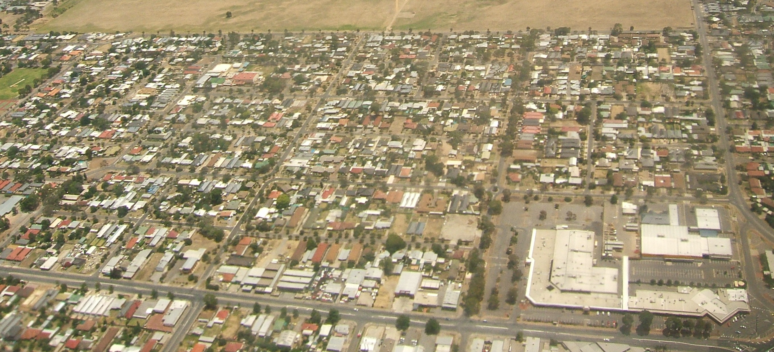 Greenacres, Adelaide